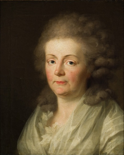 Herzogin Anna Amalia von Sachsen-Weimar und Eisenach, geb. Prinzessin von Braunschweig-Lüneburg